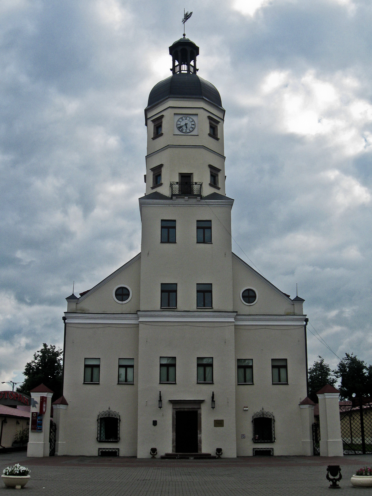 Беларуская (тарашкевіца): Гарадзкая ратуша з гандлёвымі радамі. г. Нясьвіж This is a photo of Belarusian heritage monument. Reference number: 611Г000474 ( WLM)